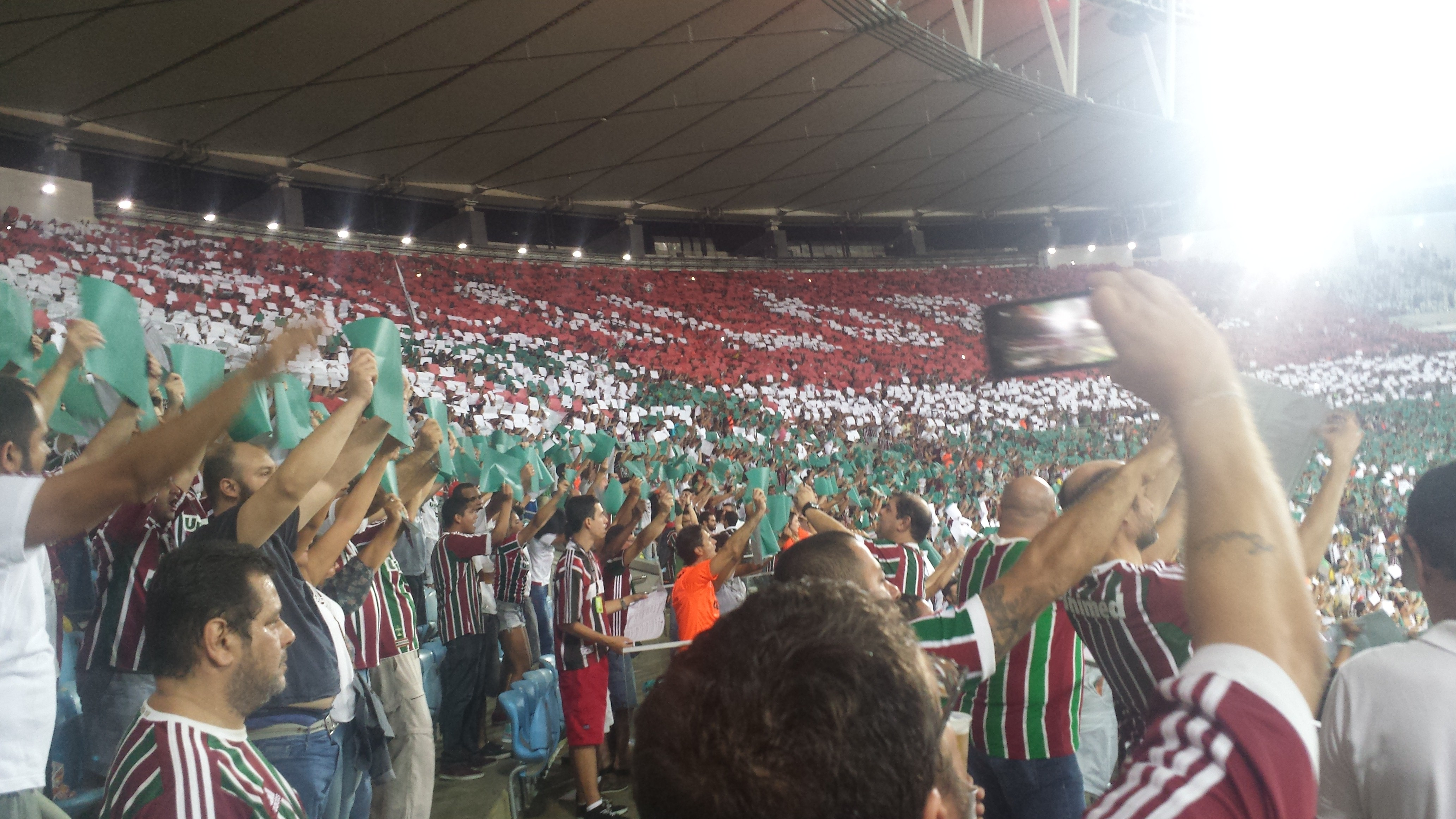 Torcida do Fluminense recebendo o time contra o Liverpool (URU) em 6-4-2017.